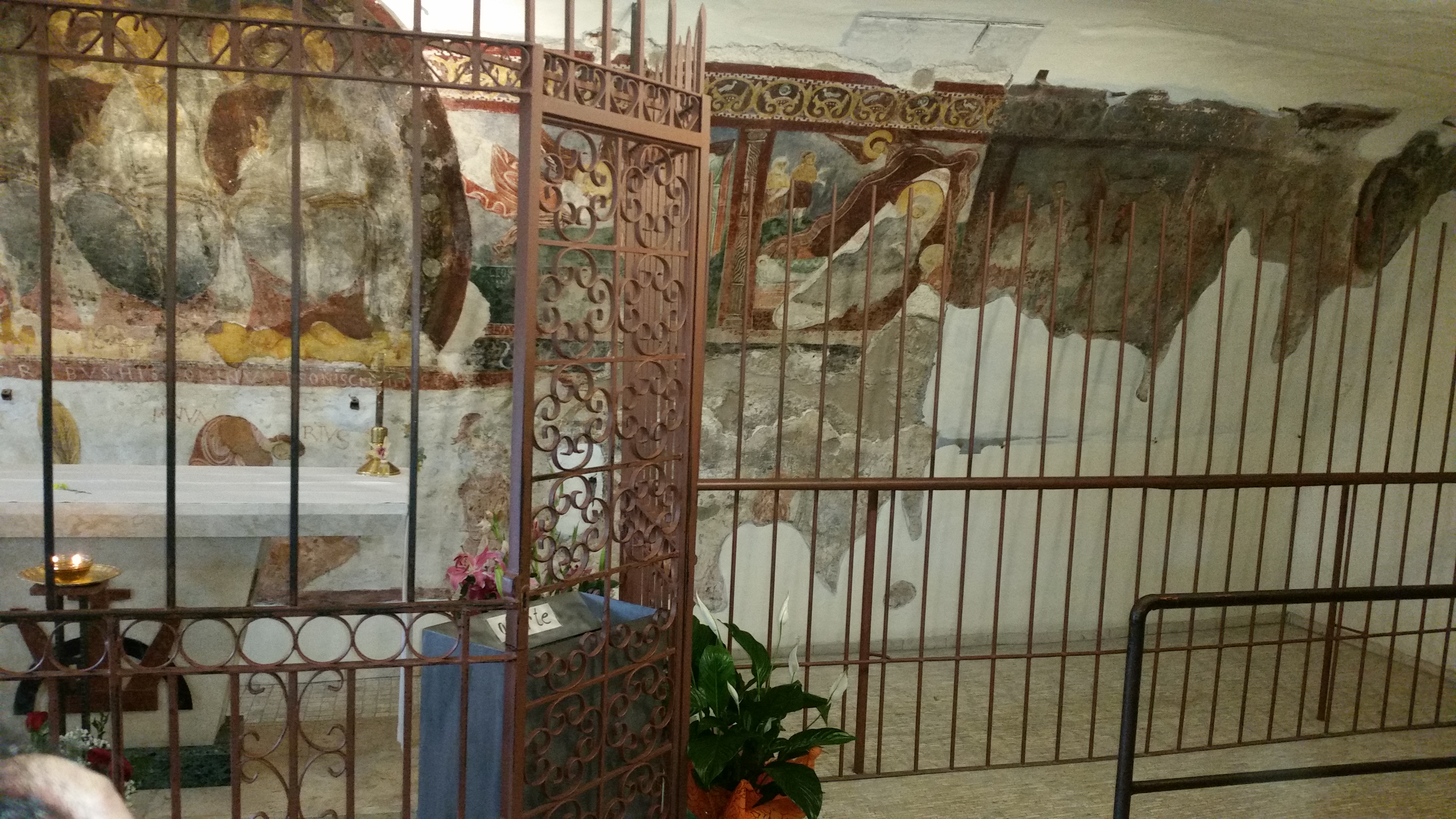 Affreschi nel santuario